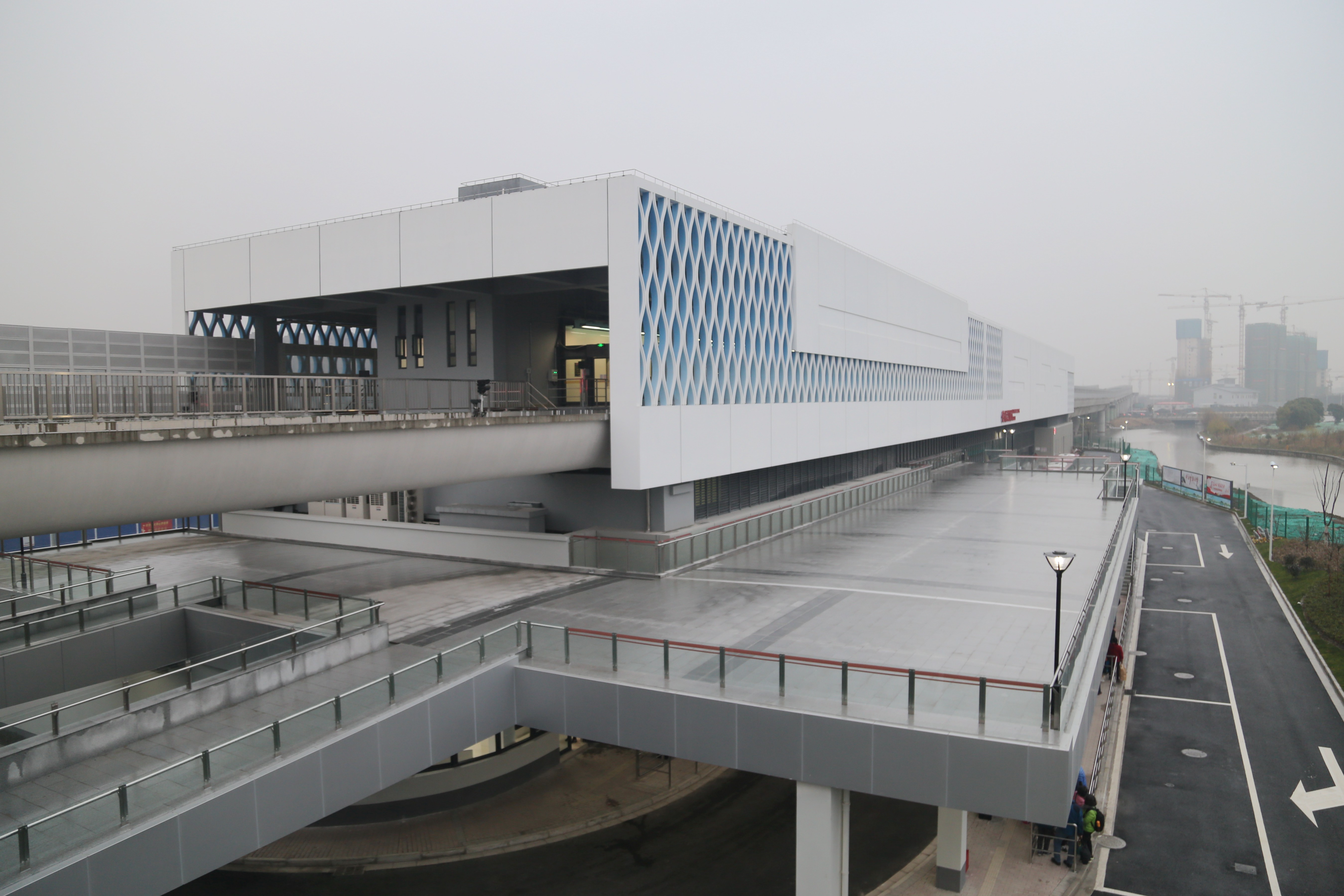 徐泾北城站站房